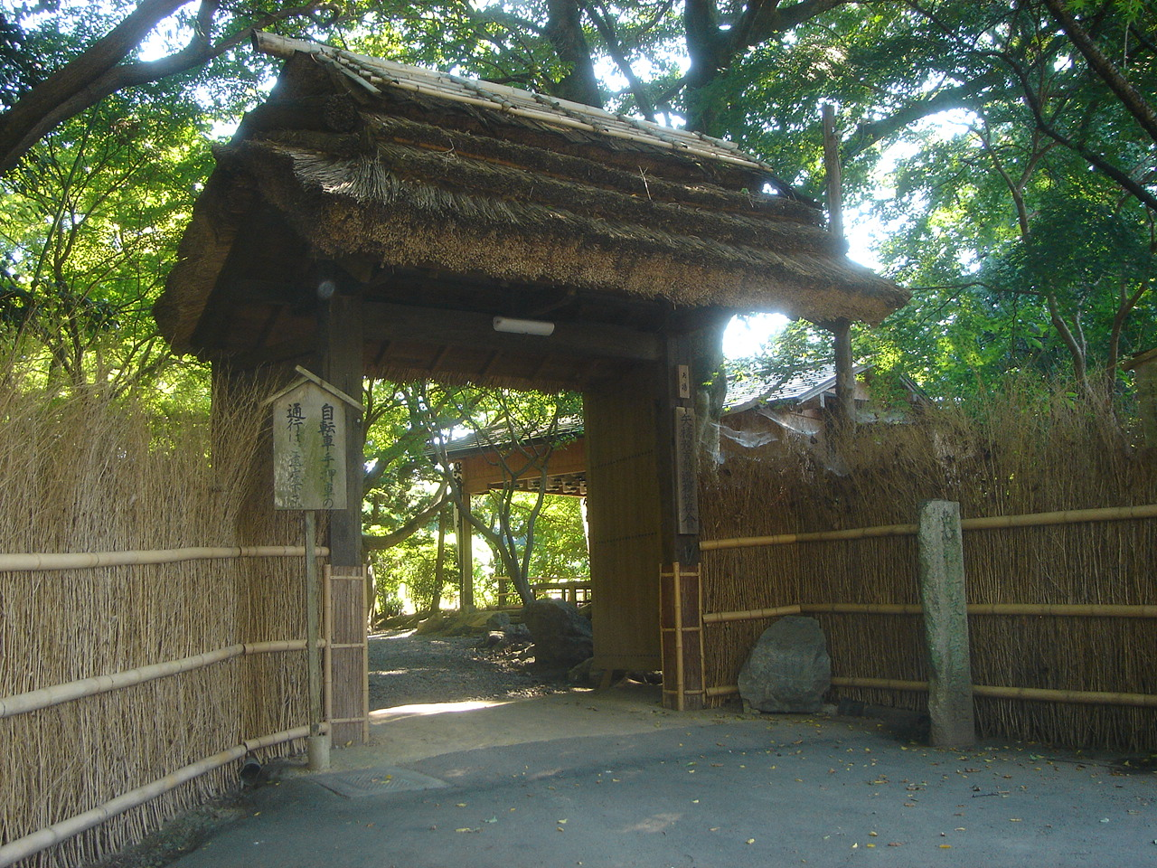 Ocyaya yashiki (お茶屋屋敷),Ogaki,Gifu,Japan(岐阜県大垣市)で撮影